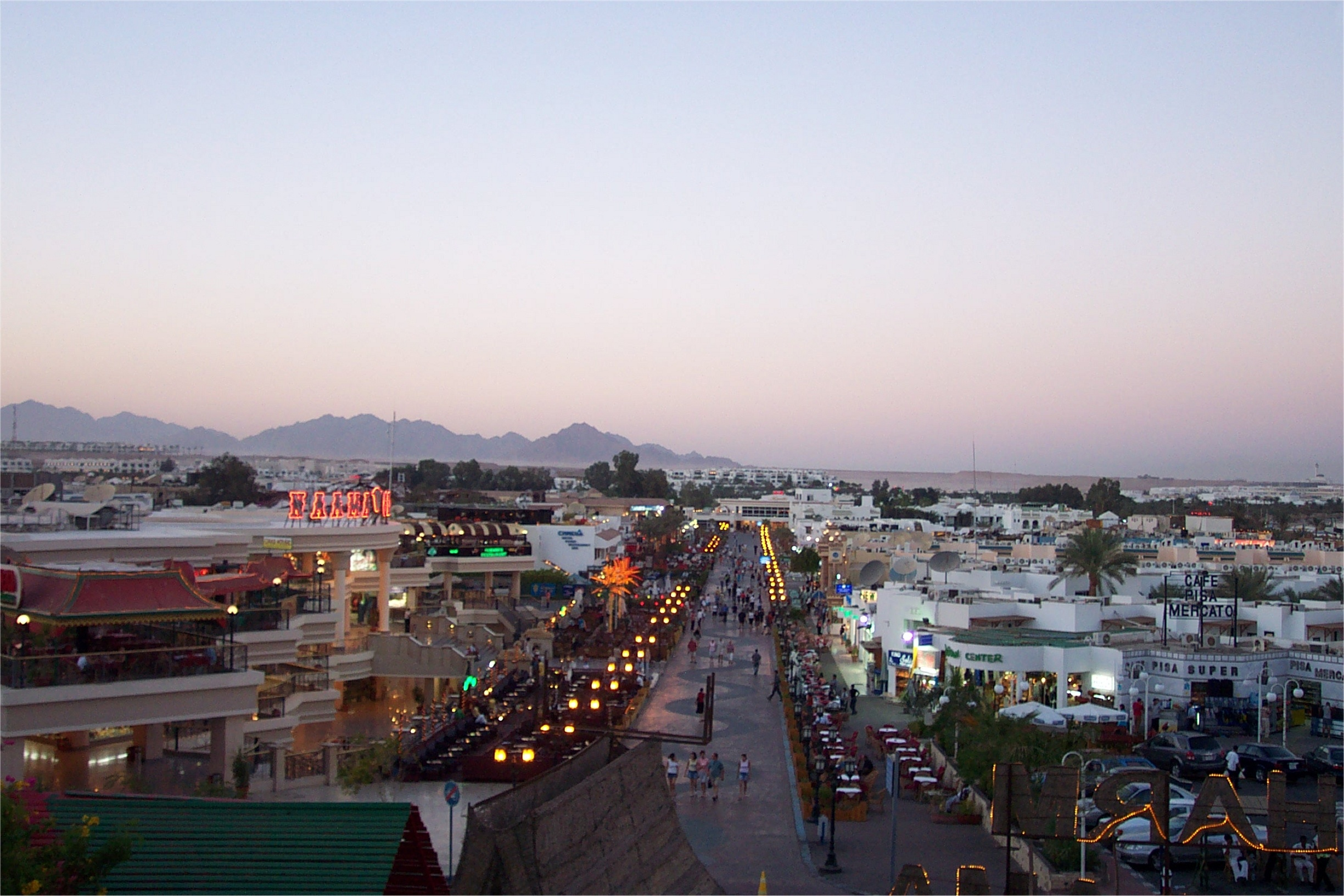 Sharm el Sheikh, King of Bahrain Street in notturna